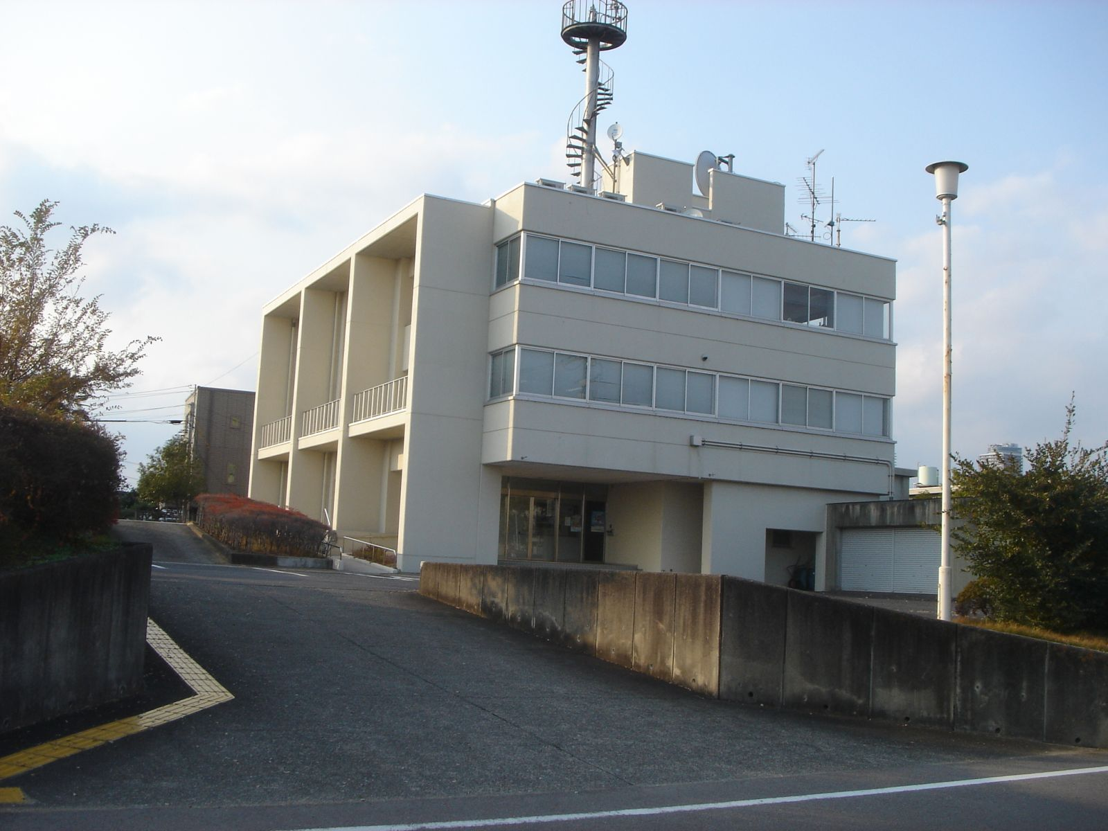 Gifu_Local_Meteorological_Observatory（岐阜地方気象台）,Gifu,Gifu,Japan(岐阜県岐阜市)で撮影。